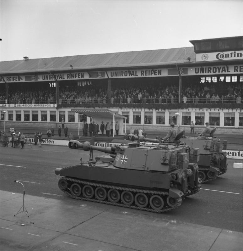 20 Jahre NATO. Bundeswehrparade auf dem Nürburgring